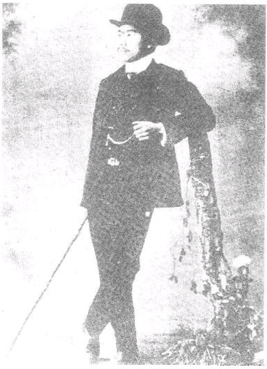 焦达峰的照片，其人于1911年去世。